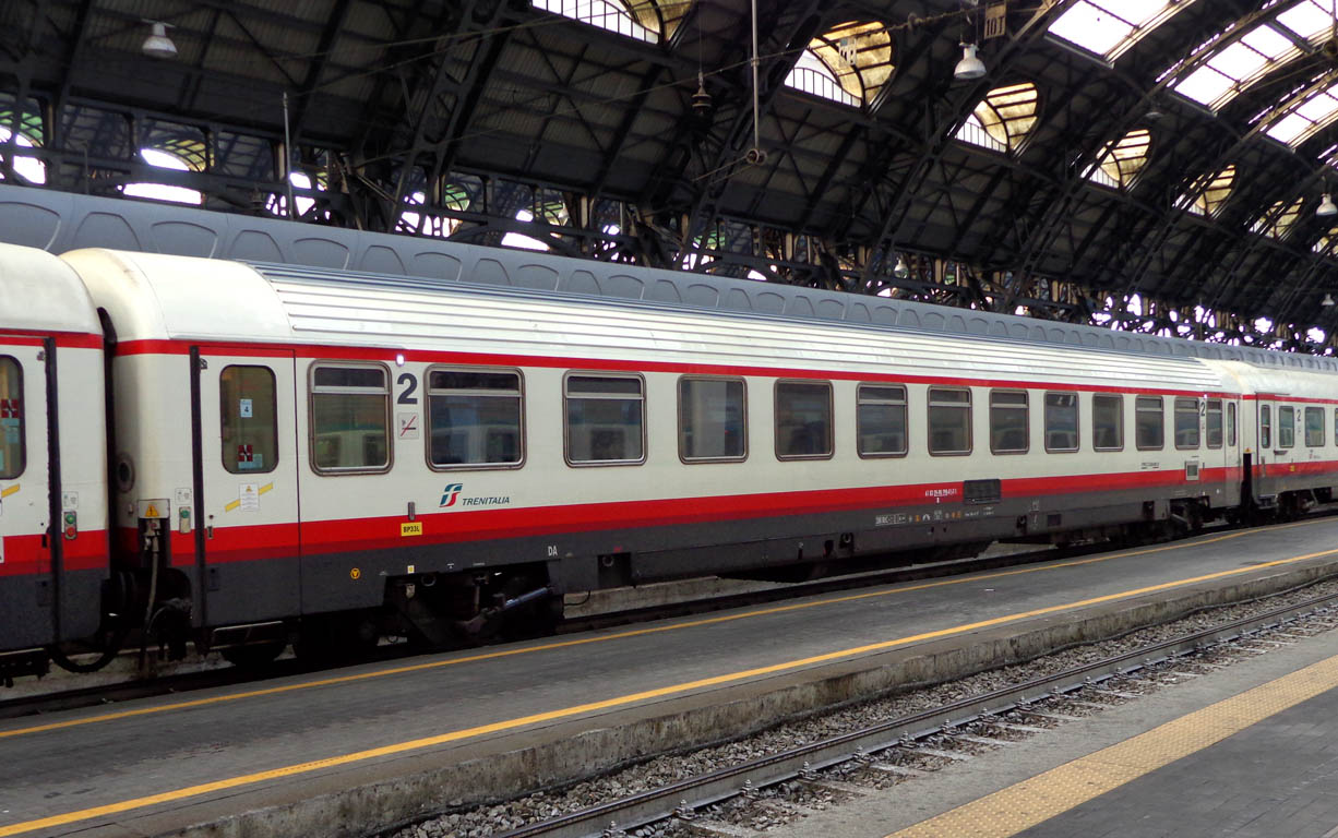 Carrozza n. 29-90 790 delle Ferrovie dello Stato (tipo Z), in livrea Frecciabianca, in composizione ad un treno in sosta a Milano Centrale.